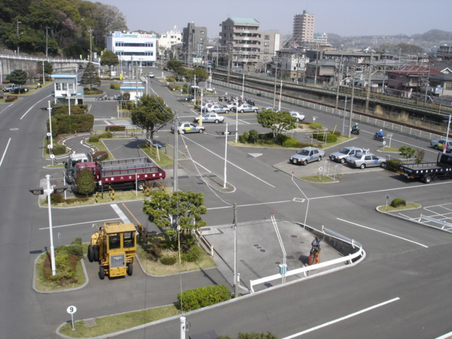 Small. 八王子自動車教習所 [1]